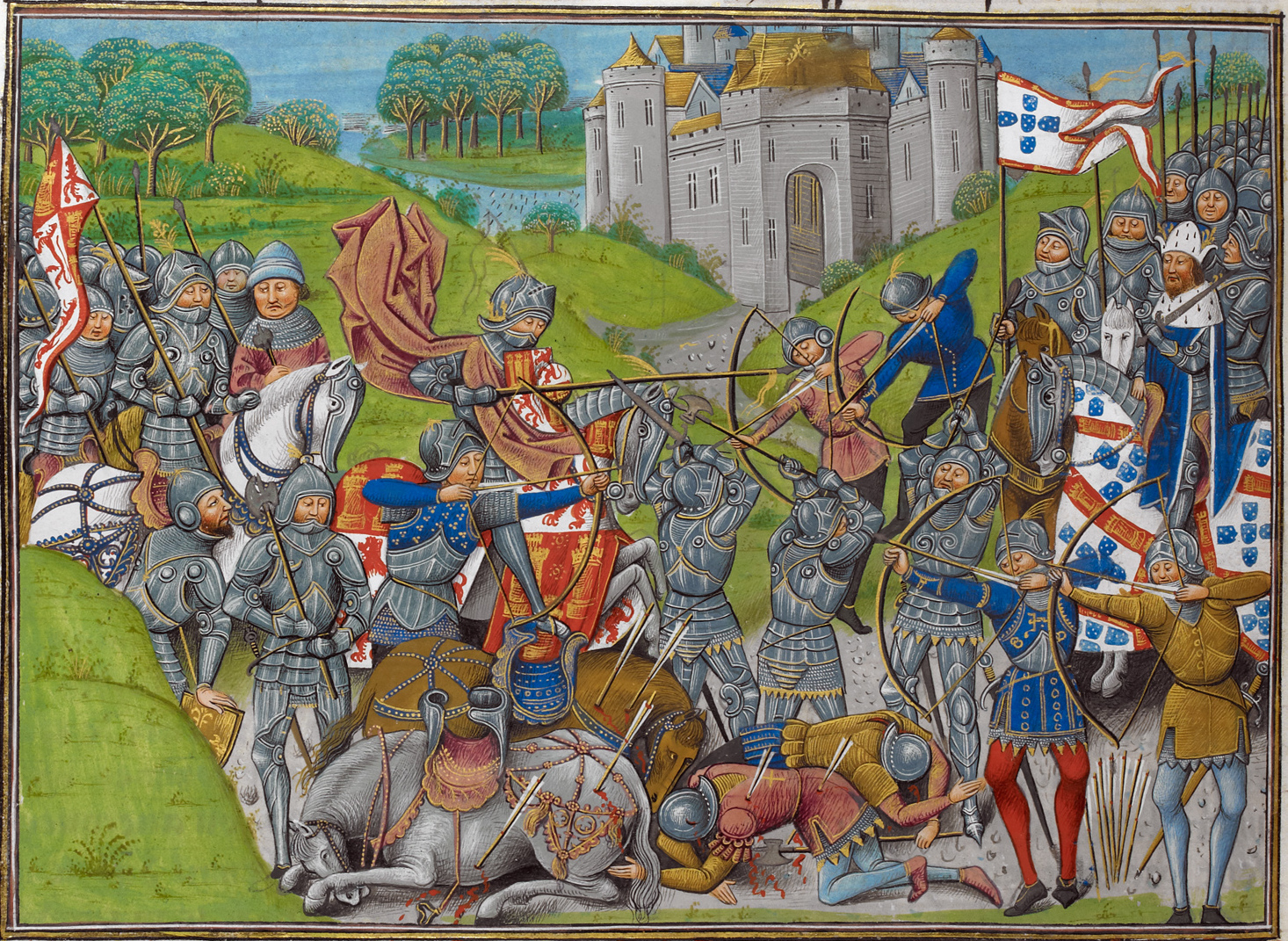 Batalla de Aljubarrota, 13 de agosto de 1385 entre las coronas de Portugal y Castilla